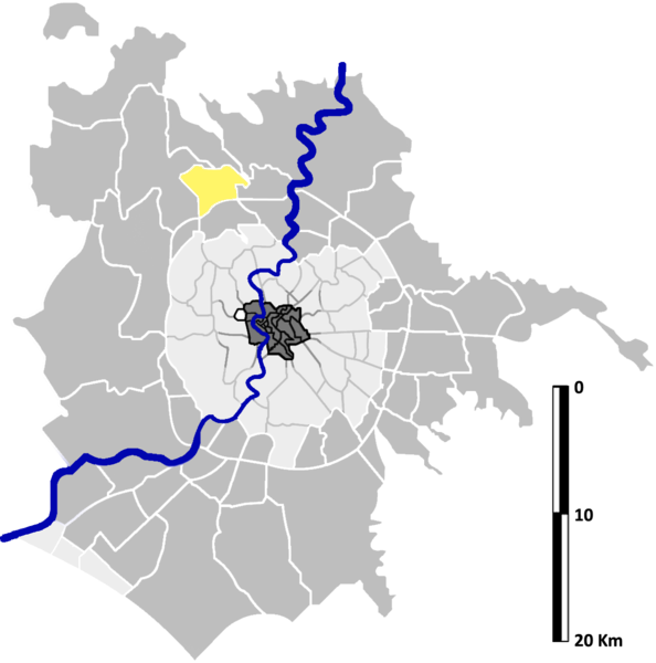 La Giustiniana